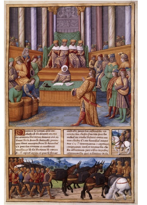 Romuleon-BnF366-fol. 42 Retour de Magon Barca à Carthage